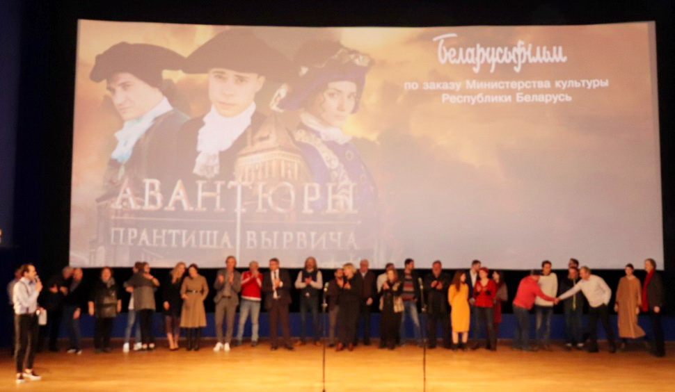 Перадпрэм'ерны паказ фільма «Авантуры Пранціша Вырвіча» у мінскім Доме кіно. Здымачная група і ўдзельнікі карціны.